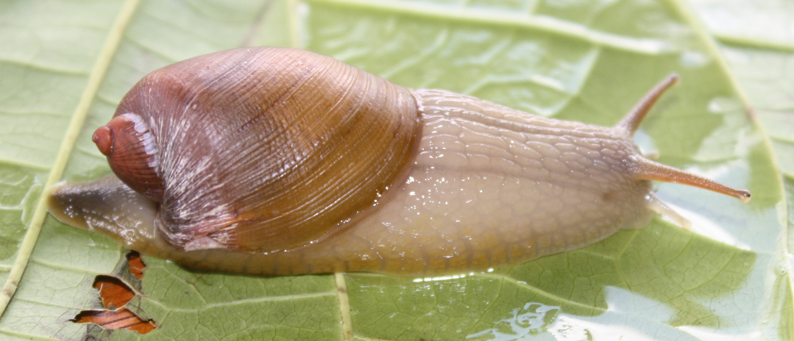 Photo d'un spécimen vivant de Amphibulima patula patula de Marie-Galante de Arnaud LENOBLE, CNRS ; photographie prise le 03/07/2018.